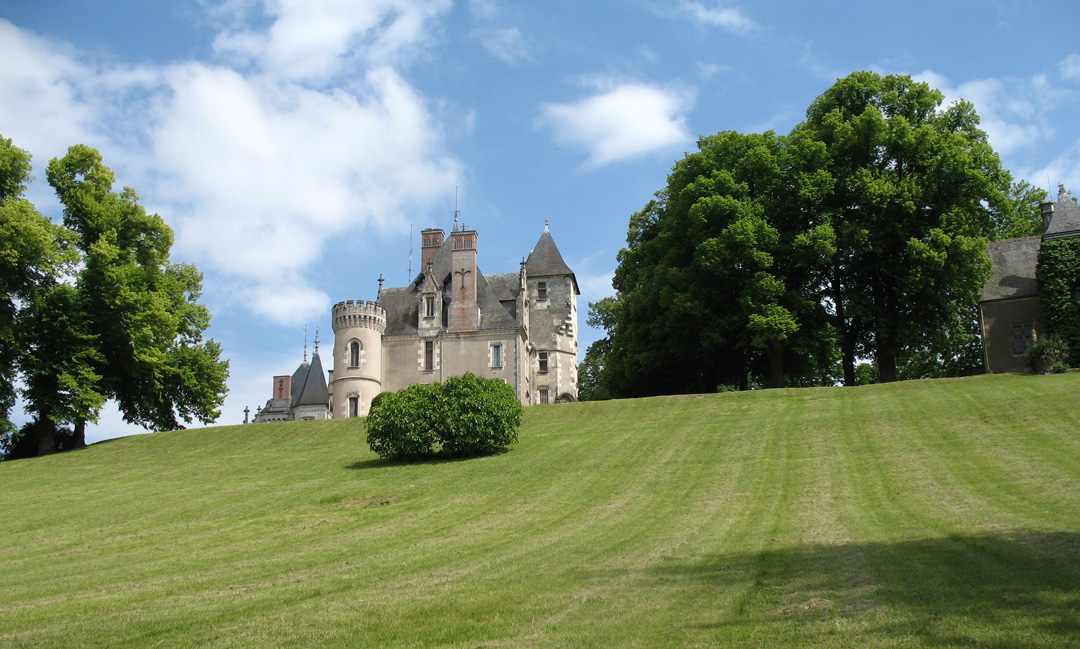 Château de Candé, Indre-et-Loire, France